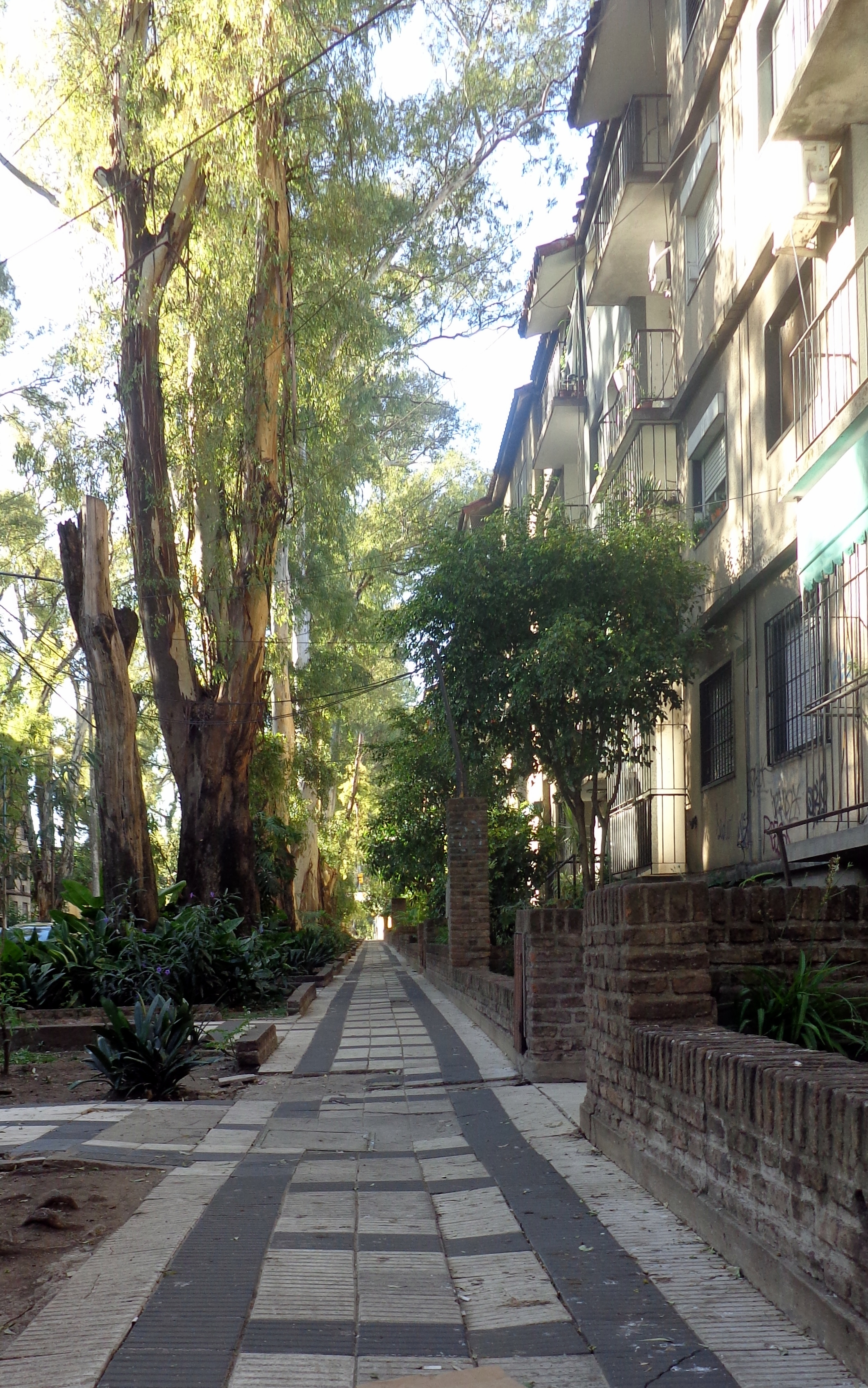 Fue inaugurada en 1944, en Lomas del Palomar, Provincia de Buenos Aires, Argentina. Ideada por el empresario alemán Erick Zeyen. Considerada primera en su tipo en Sudamérica, busca tanto los beneficios de lo urbano como de lo rural: posee espacios verdes destinados al ocio, disposición que ofrece equipamiento cultural de todo tipo: escuelas, iglesias, clubs y parques están entremezclados y a distancia de paseo de todas las viviendas.